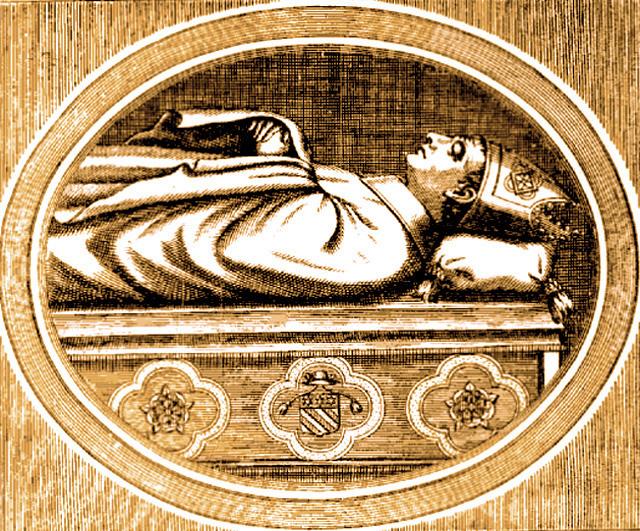 Cardinal Pierre des Prés